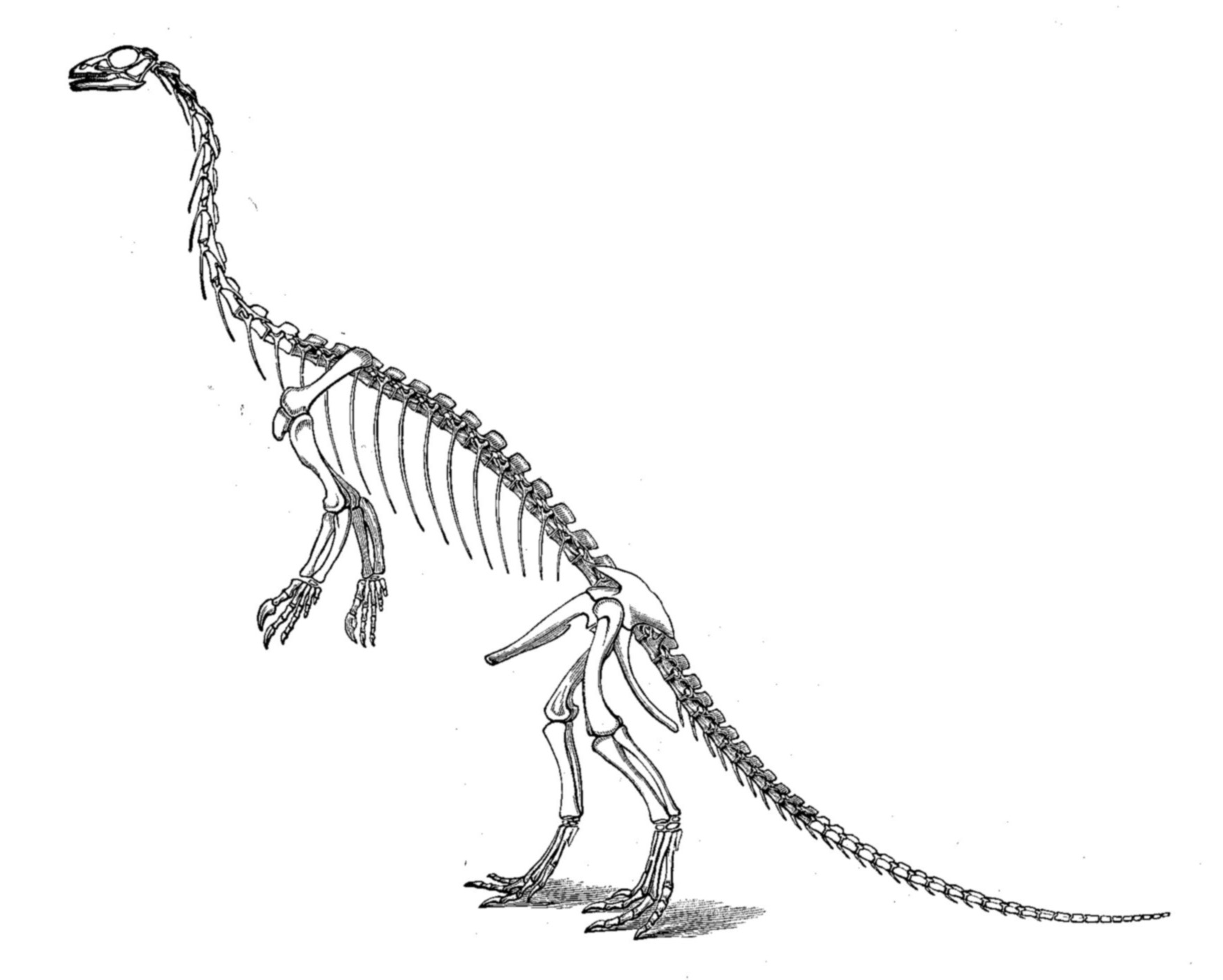 Anchisaurus colurus Skeleton.